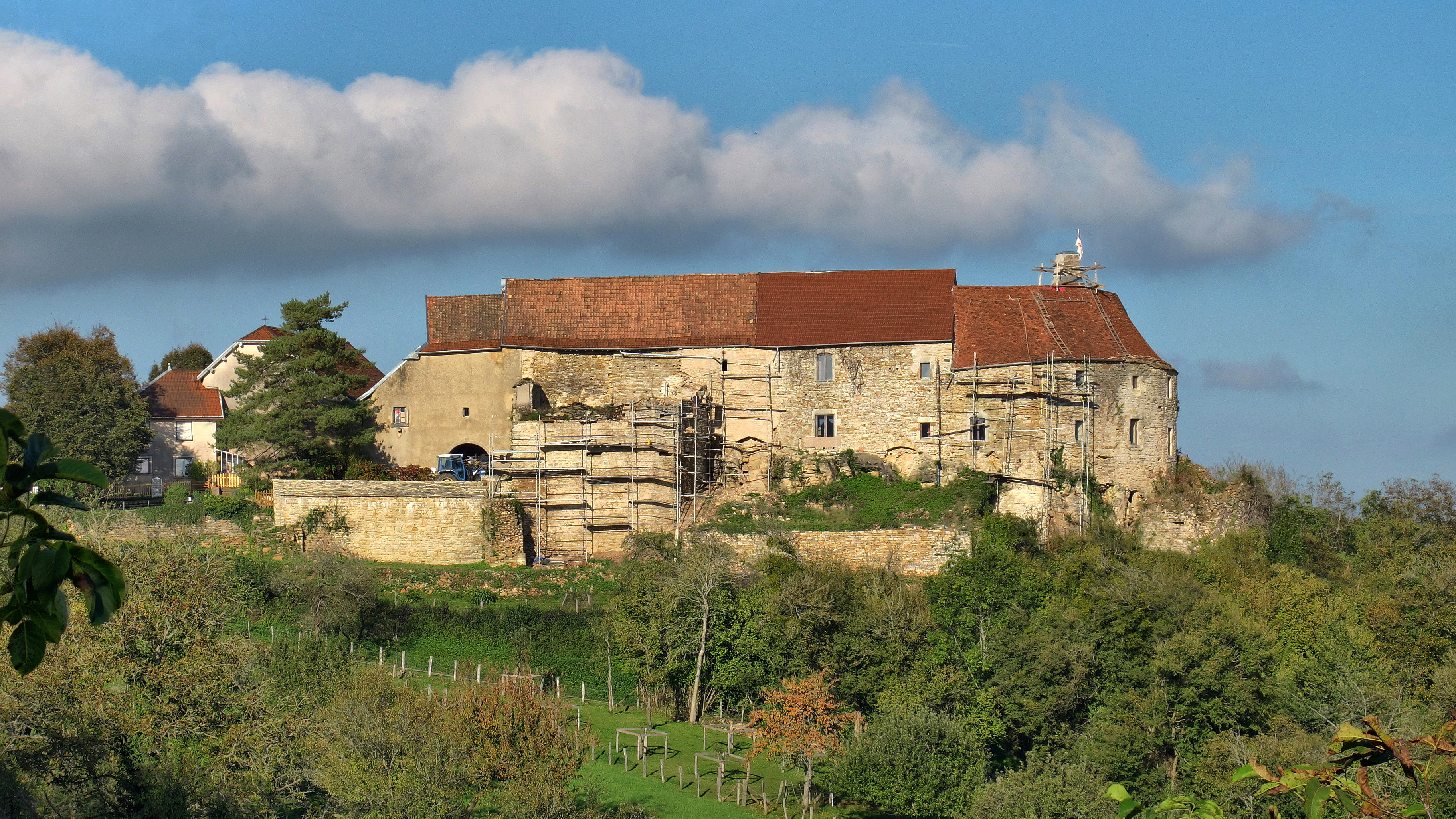 Inscrit aux monuments historiques sous le numéro PA25000067